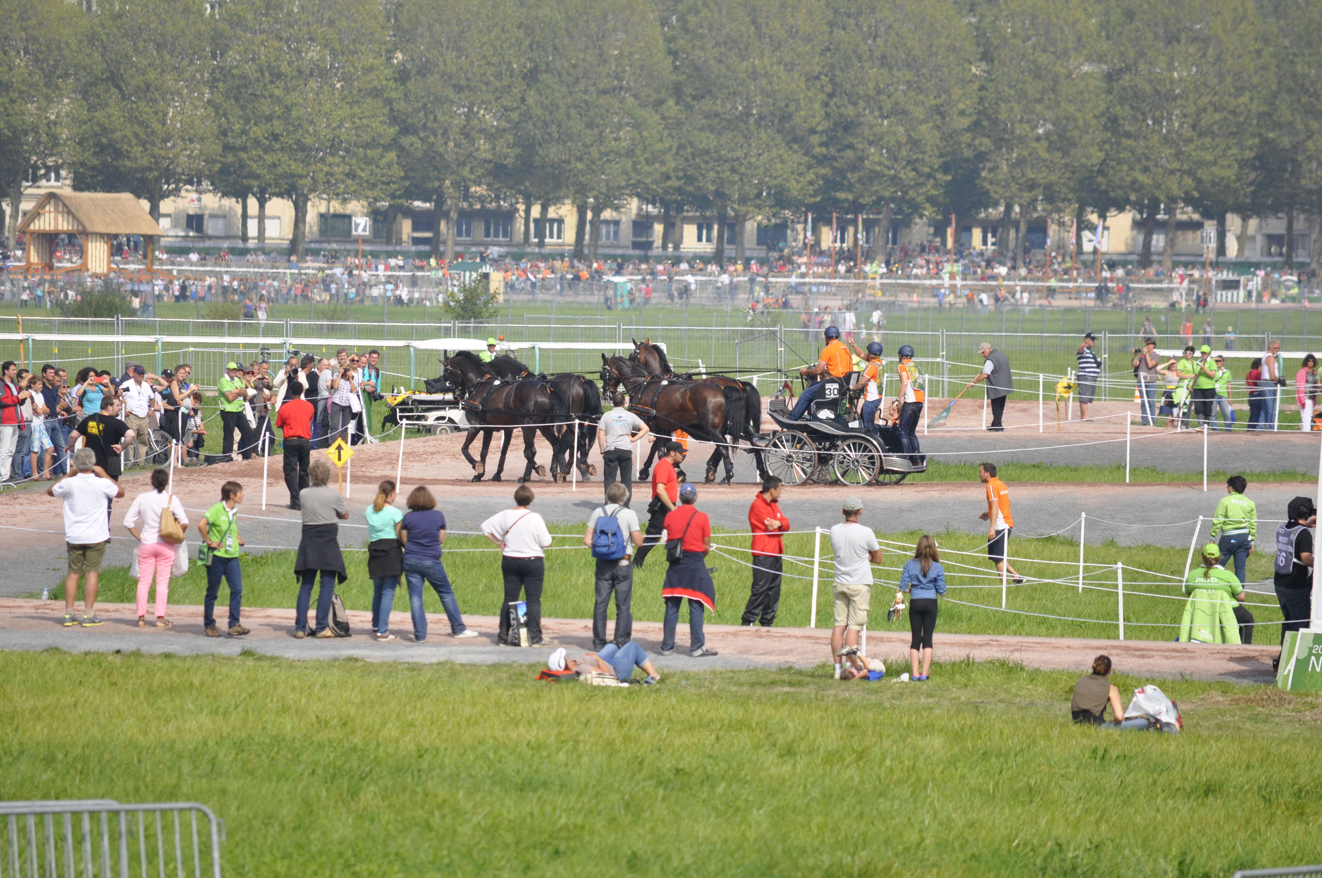 jsbrand Chardon